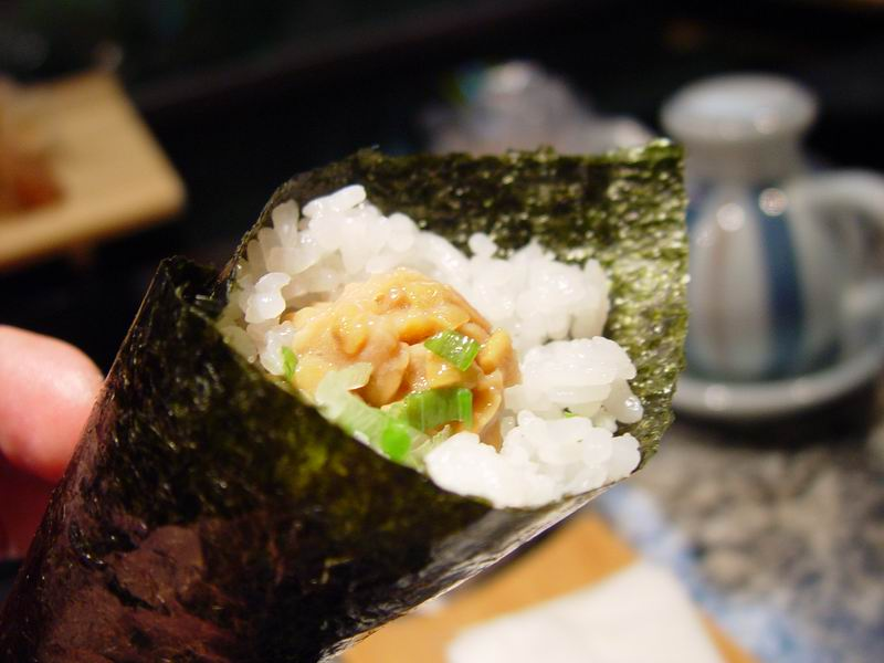 Natto Temaki @ Sushi Koh (2001-12-12)DSC00311